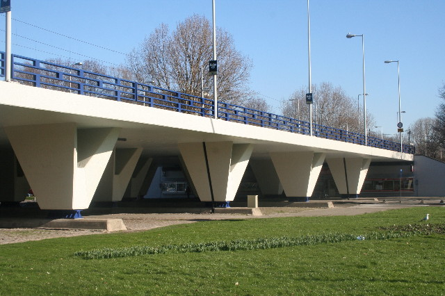 Viaduct van de Cornelis Lelylaan over de Johan Huizingalaan, brug nr. 705. Foto: Erik Swierstra.